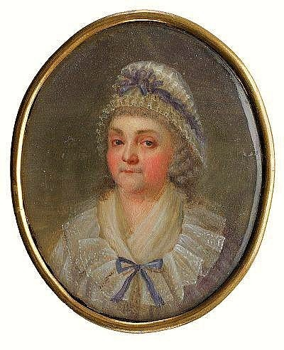 Александра Александровна Кологривова, ур. Хитрово (1736-1796), в первом браке княгиня Голицына.